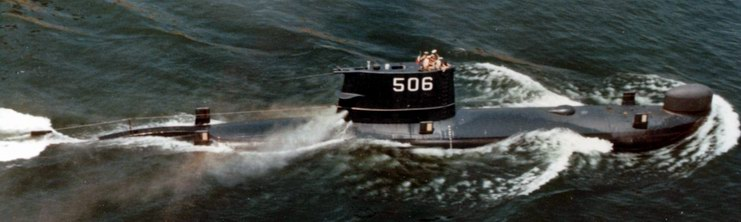 Il sommergibile Toti in navigazione Il sito da cui è tratta la foto dichiara che il materiale che vi compare è di pubblico dominio [1]